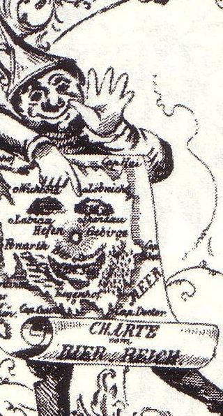 Ausschnitt aus [Um den Gerstensaft (Clericus).JPG]: Karte des Königsberger Bierreichs